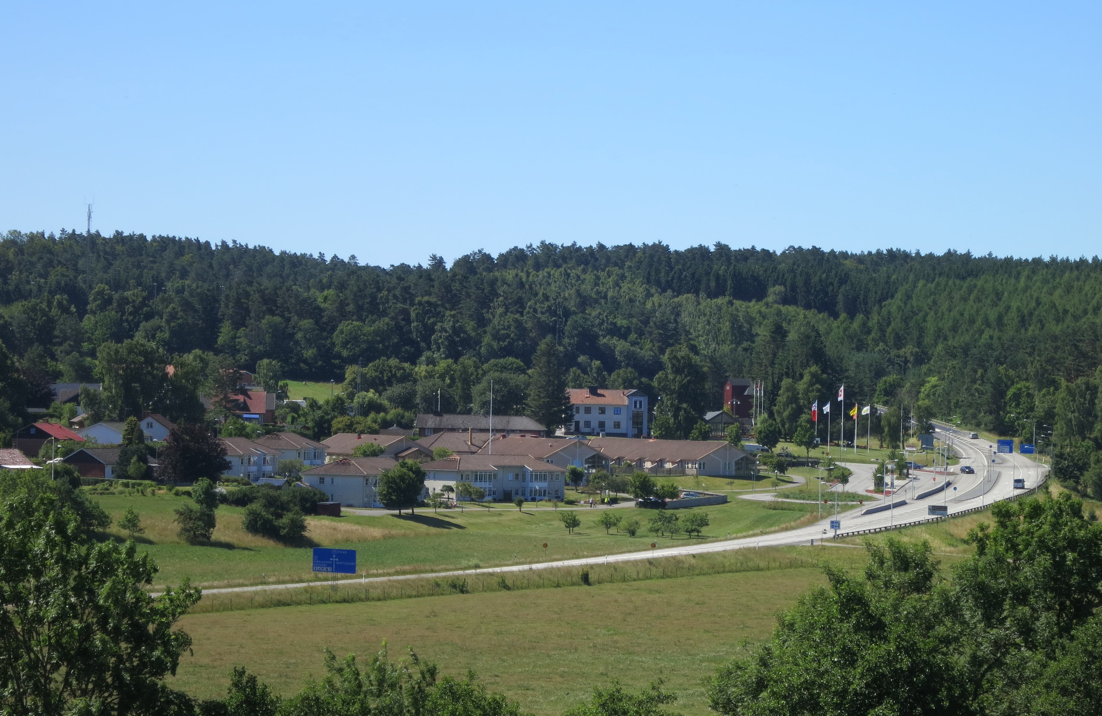 Riksväg 19 med Brösarp i bakgrunden.